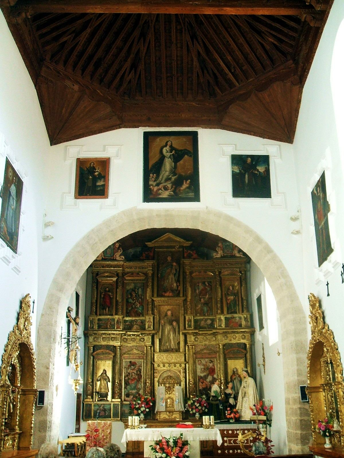 Interior de la Iglesia del Monasterio de Santa Sofía (MM Canónigas Norbertinas Premonstratenses), Toro, Zamora, Castilla y León, España